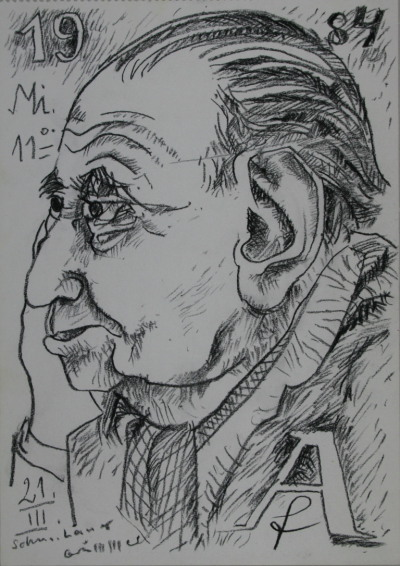 Portraitskizze Albrecht Fabri